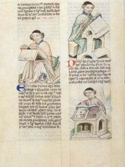 Seite aus dem Gutachten über den Bacharacher Pfarrwein, illustriert von Winand von Steeg